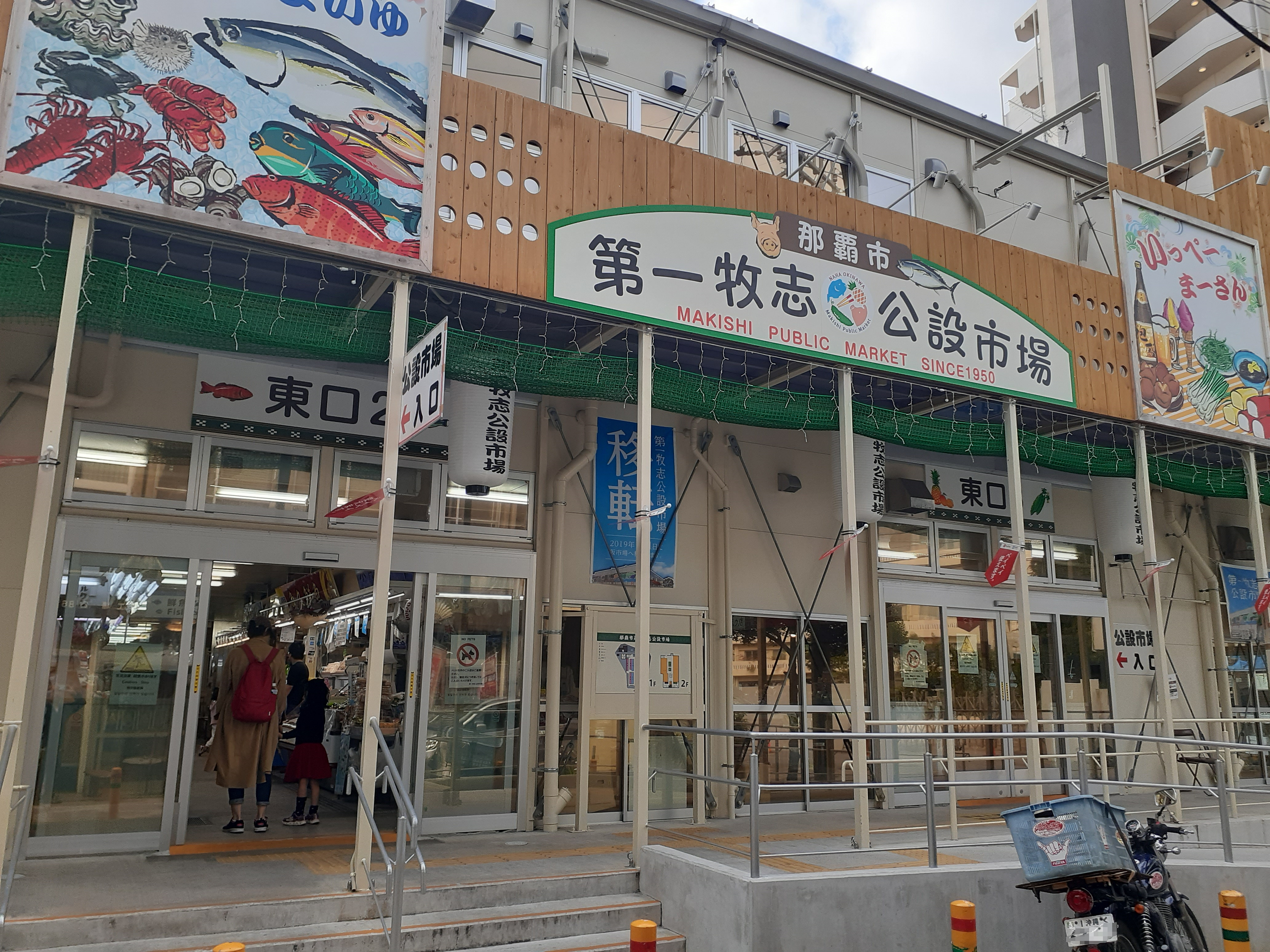 仮移転先の第一牧志公設市場（2020年1月5日撮影）。プライバシー保護のために加工した場所があります。